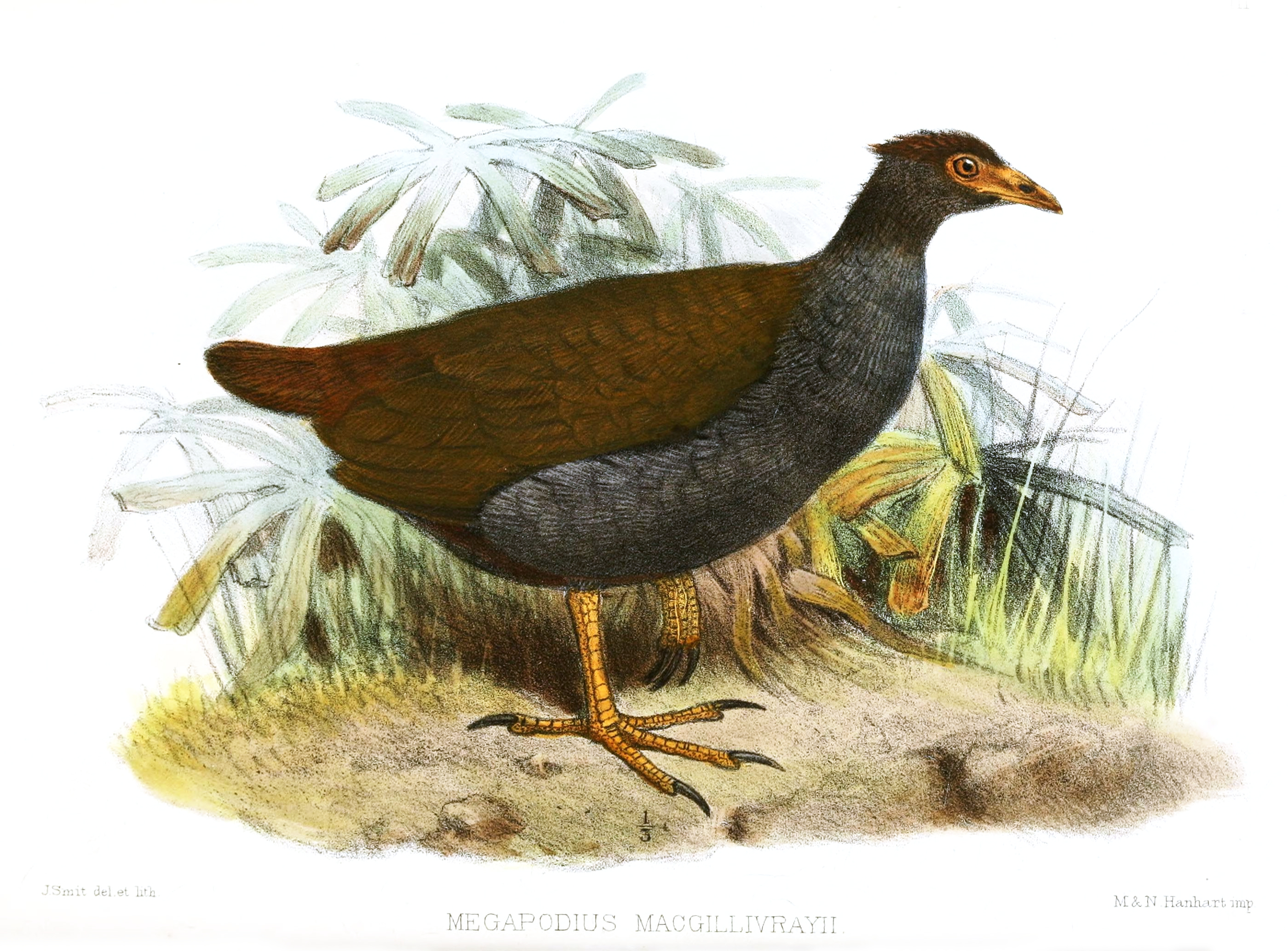 Megaopodius macgillivrayii = Megapodius reinwardt macgillivrayi